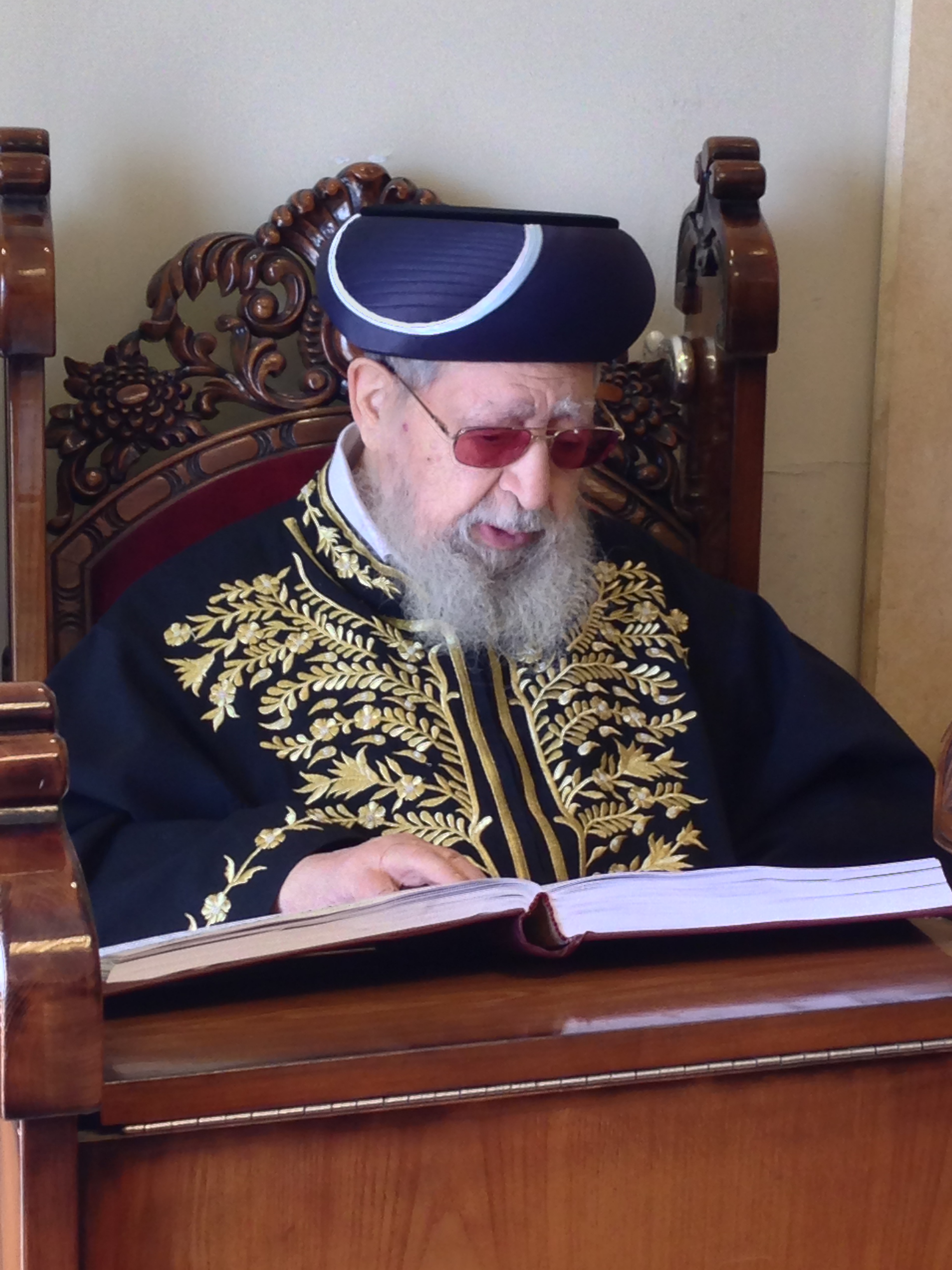 הרב עובדיה יוסף זצ"ל. צולם בבית הכנסת שמתחת לביתו.